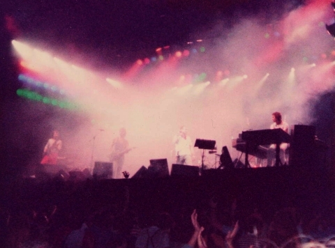 Genesis in corcerto. Tirrenia (Pisa) - Settembre 1982